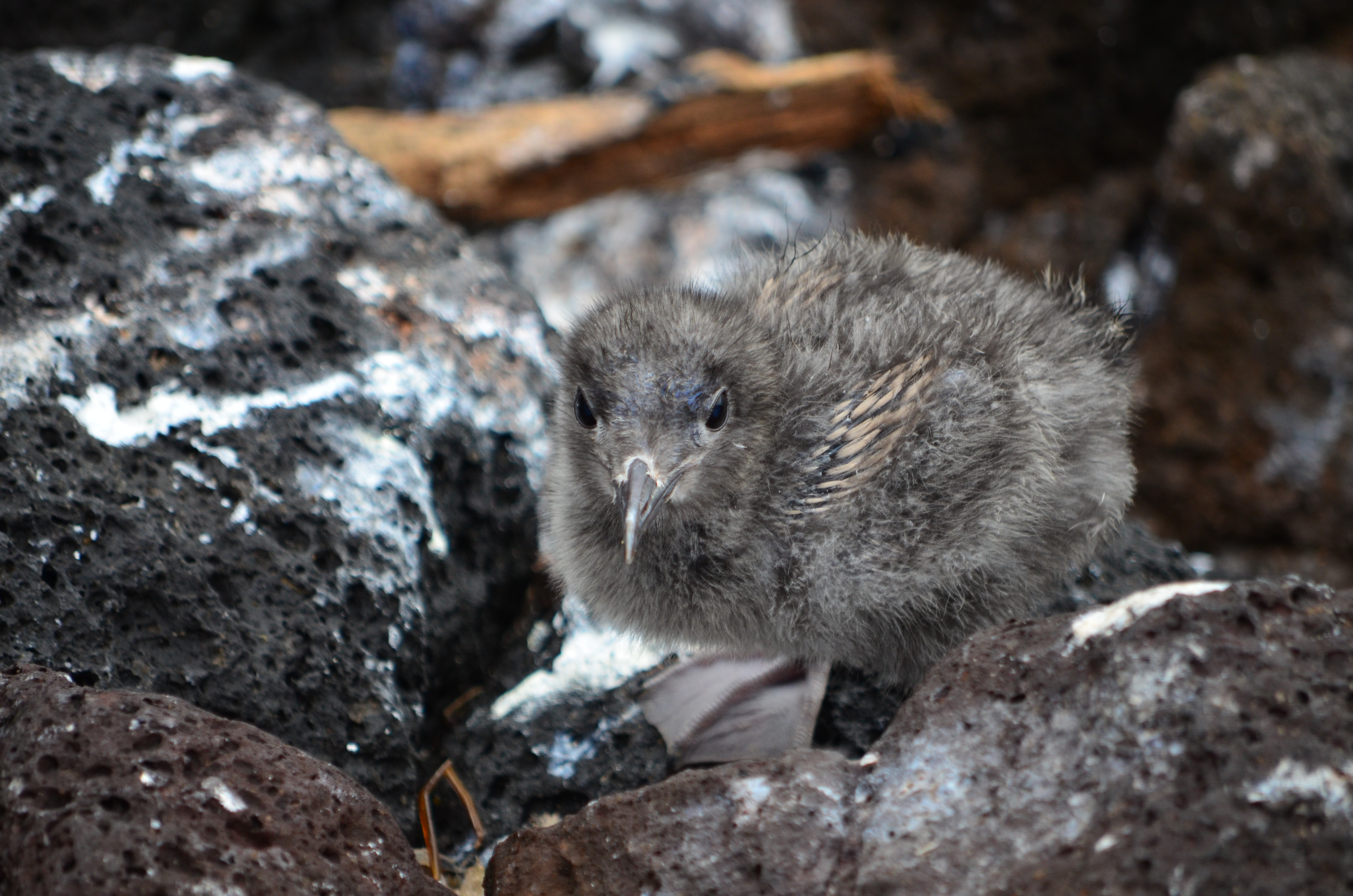 Lava Gull hatchling, Galápagos